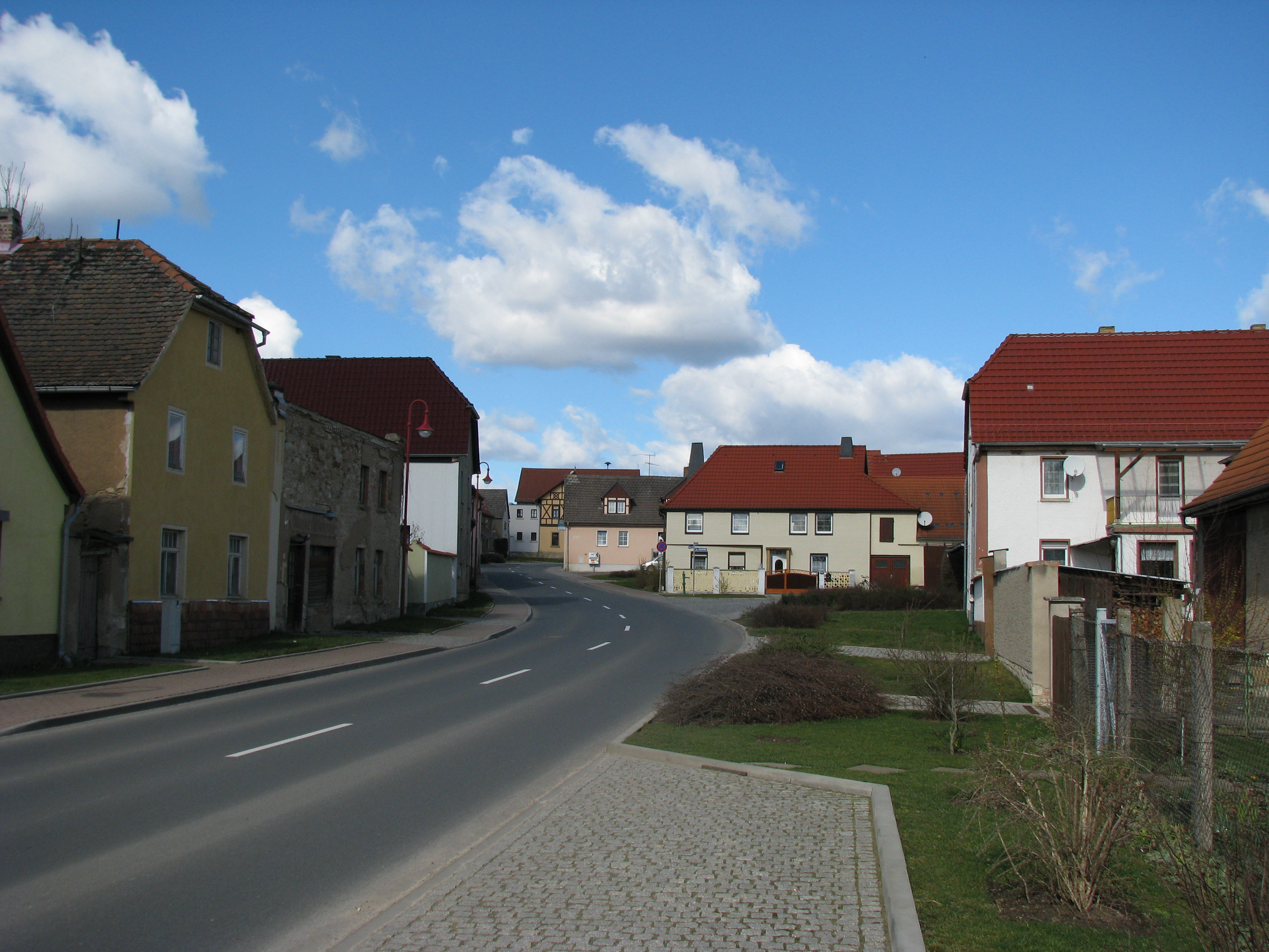 Hardisleben (DE) - Blick auf die Straße